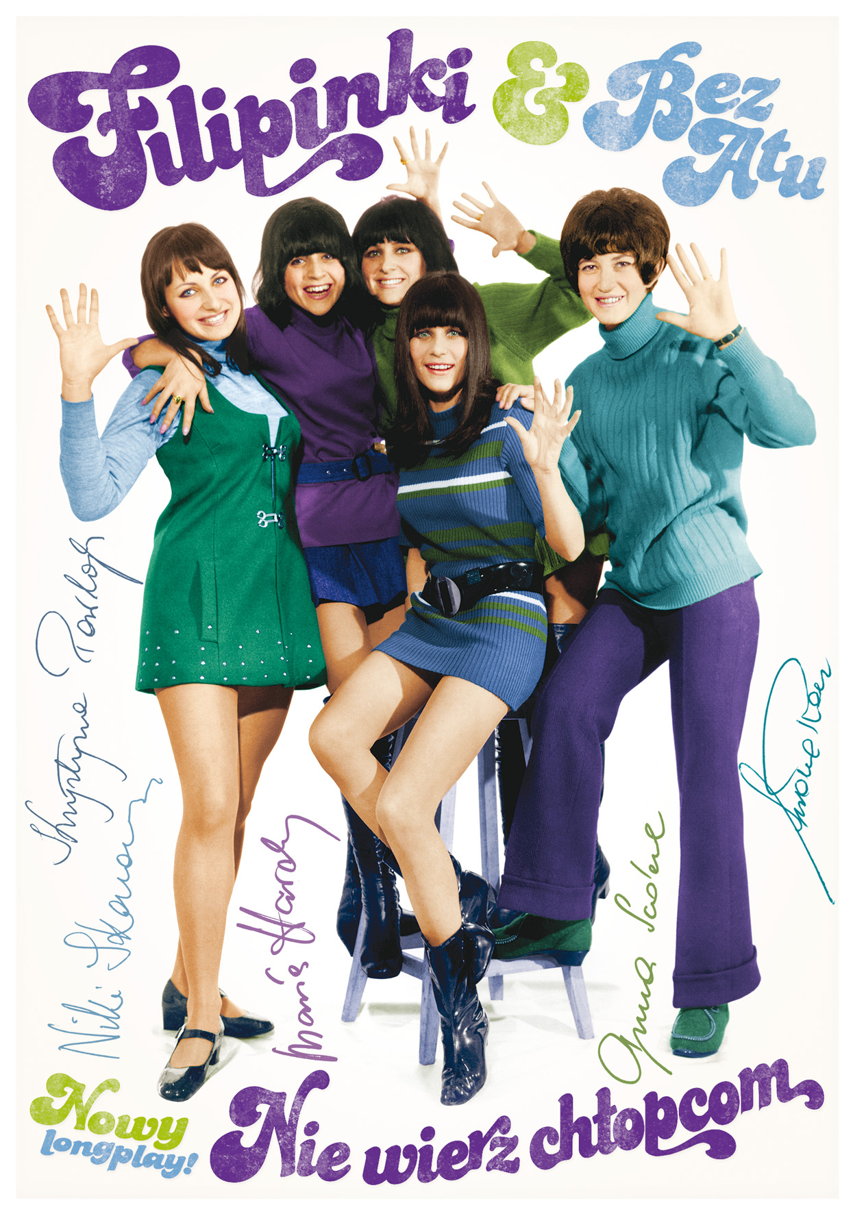 Karta pocztowa reklamująca płytę Filipinek i Bez Atu „Nie wierz chłopcom”.